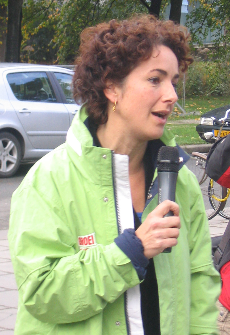 Femke Halsema, GroenLinks politician, in De Uithof